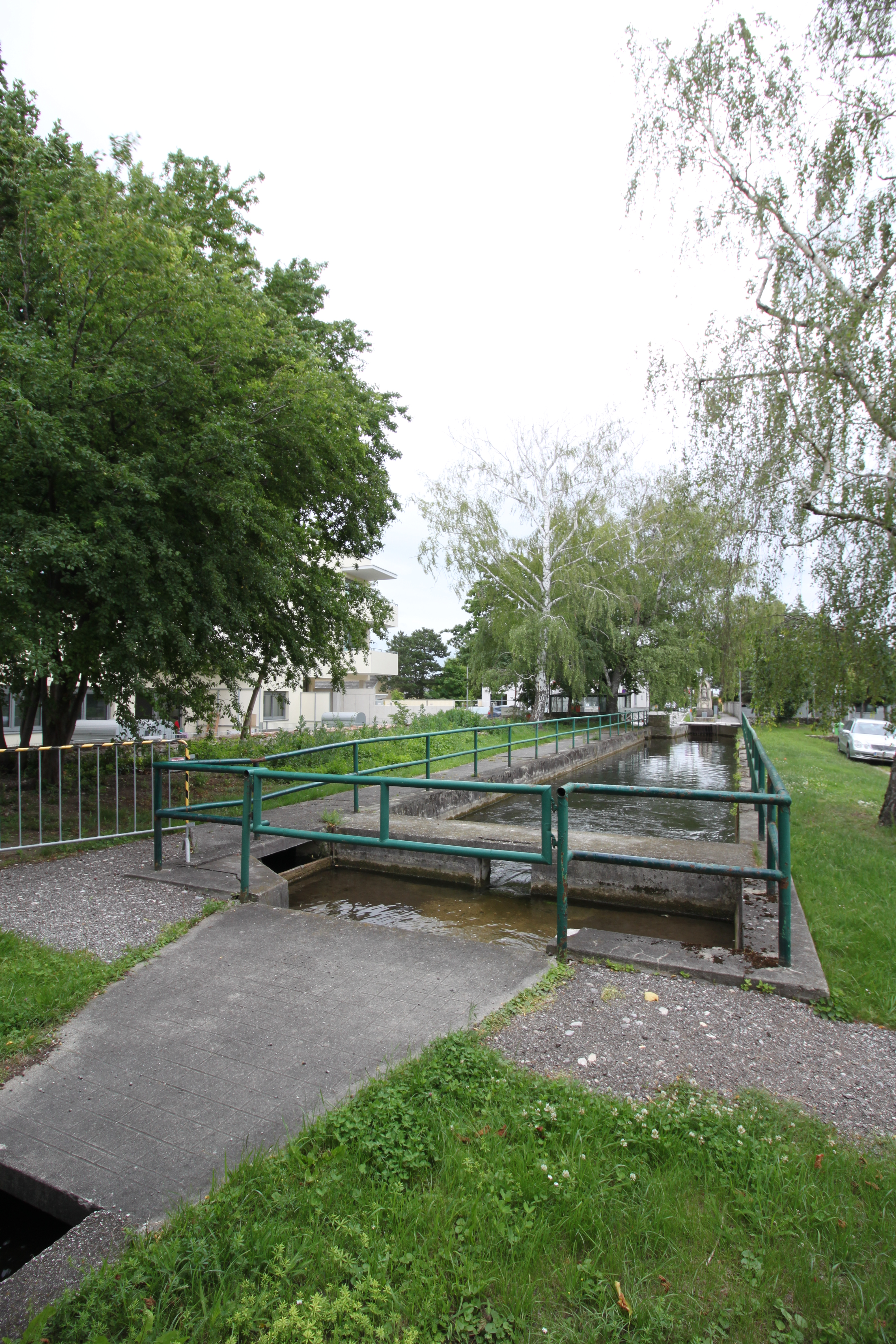 Tirolerbach Sammelbecken, vor der Unterquerung des Baches der Durchfahrtsstraße in Theresienfeld